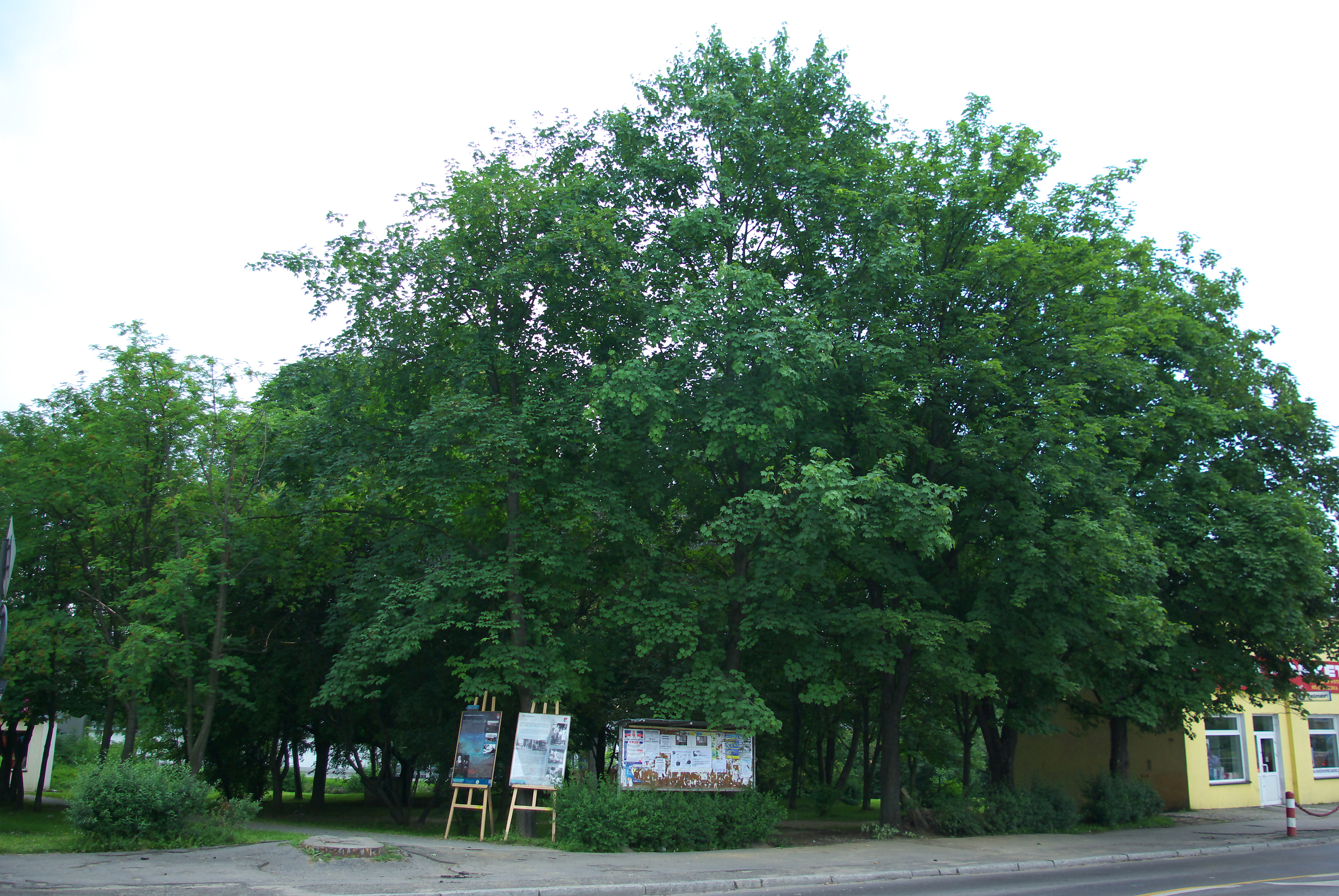 Zieleniec Beksińskiego przy ulicy Jagiellońskiej w Sanoku.